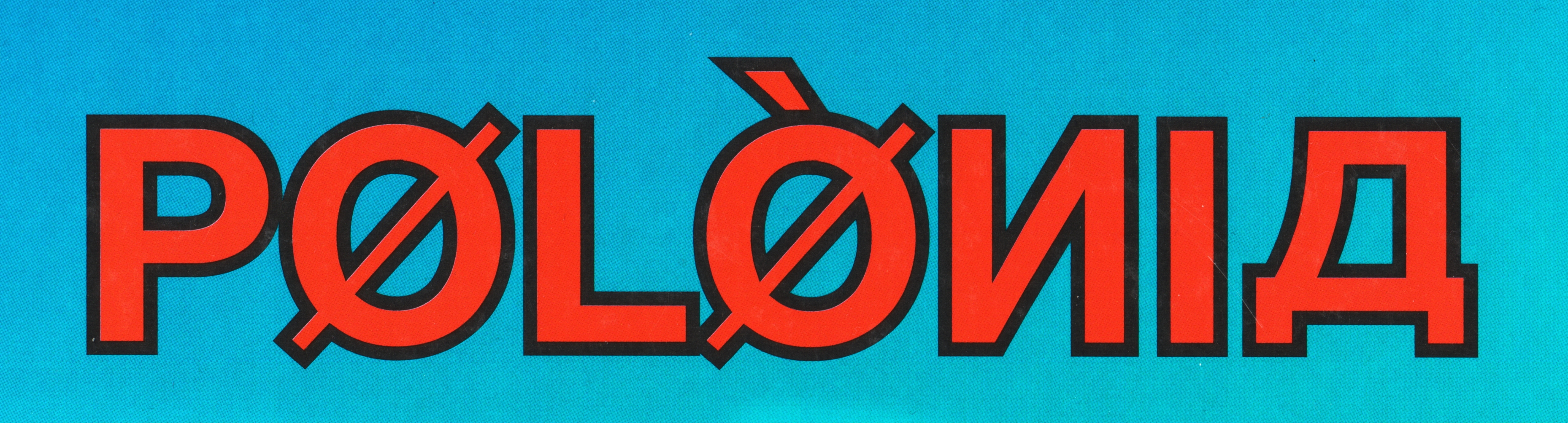 Text "Polònia" de la portada del llibre Polònia - Tenim un problema.